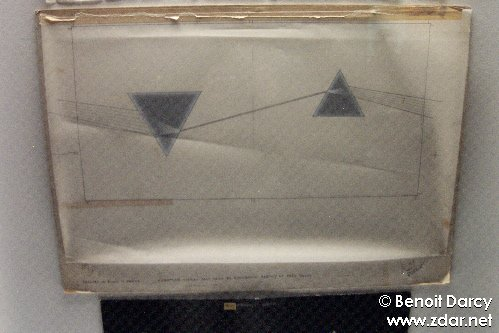 Photos de l'exposition "Pink Floyd Interstellar" à la Cité de la Musique (Porte de la Villette, Paris). Read the story at . Lire le compte-rendu de l'expo sur